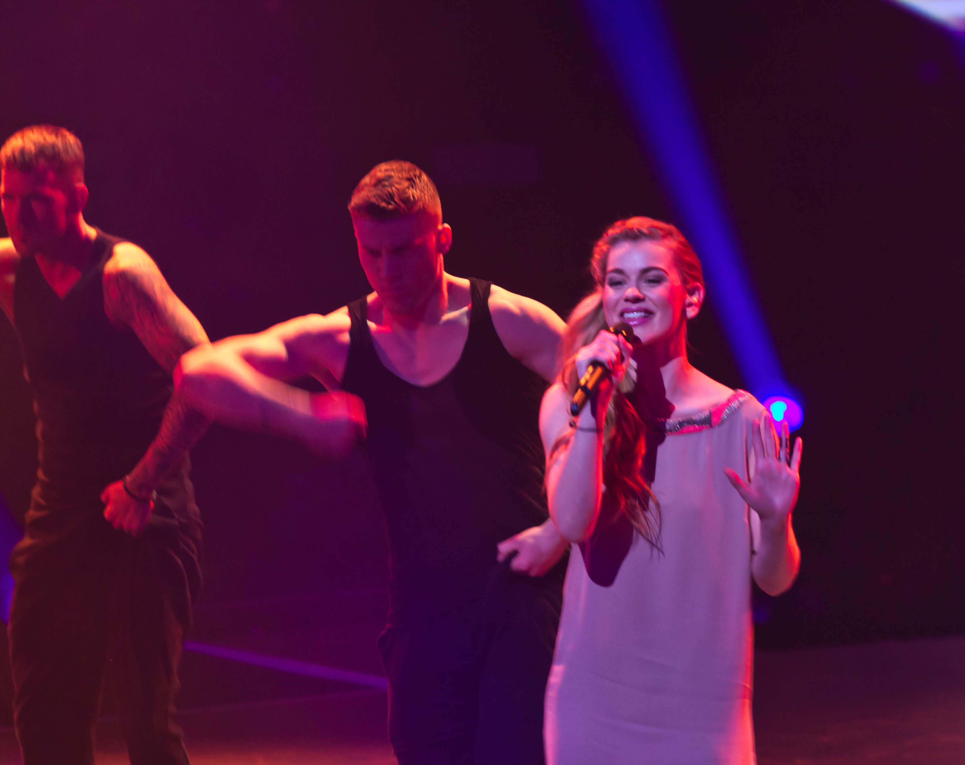 Unser Song für Dänemark - Livesendung Foto: Während der Abstimmungsphase sang Emmelie de Forest ihren Song „Rainmaker“, die offizielle Hymne des ESC in Kopenhagen.